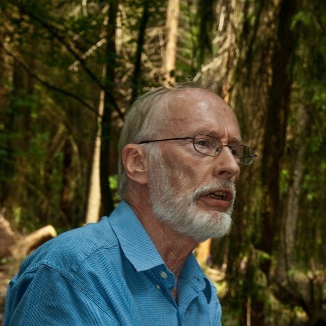 Erik Martin während einer öffentlichen Führung durch die Sequoiafarm Kaldenkirchen.